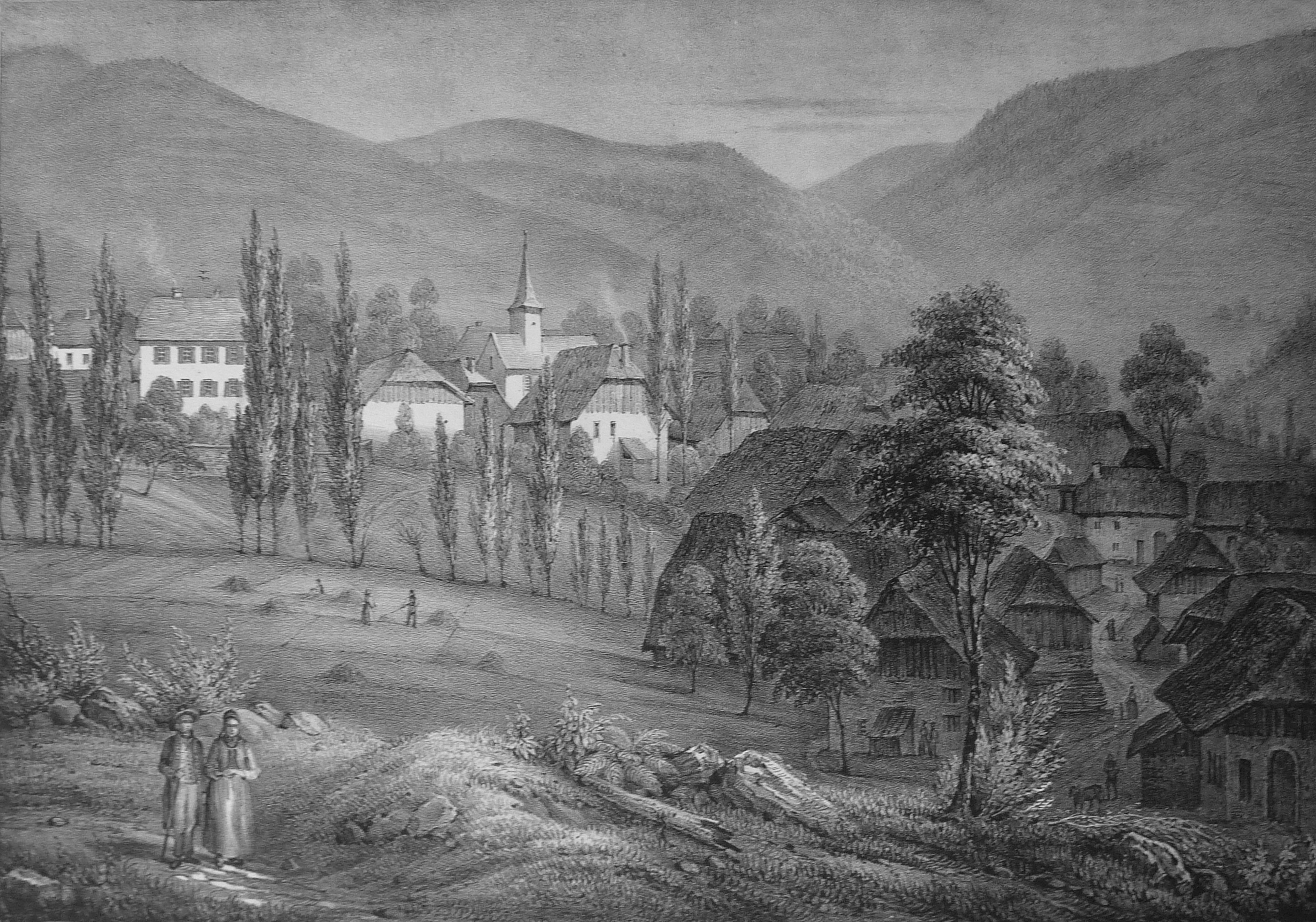 Waldbach (Waldersbach), lithographie de Théophile Schuler, extrait de la série des vues du Ban-de-la-Roche, 1837. Musée Jean-Frédéric Oberlin à Waldersbach (Bas-Rhin).